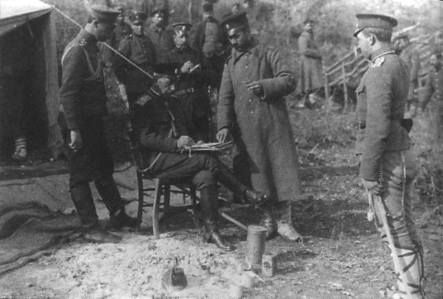 Командирът на 51 пехотен полк със своя щаб по време на Балканската война